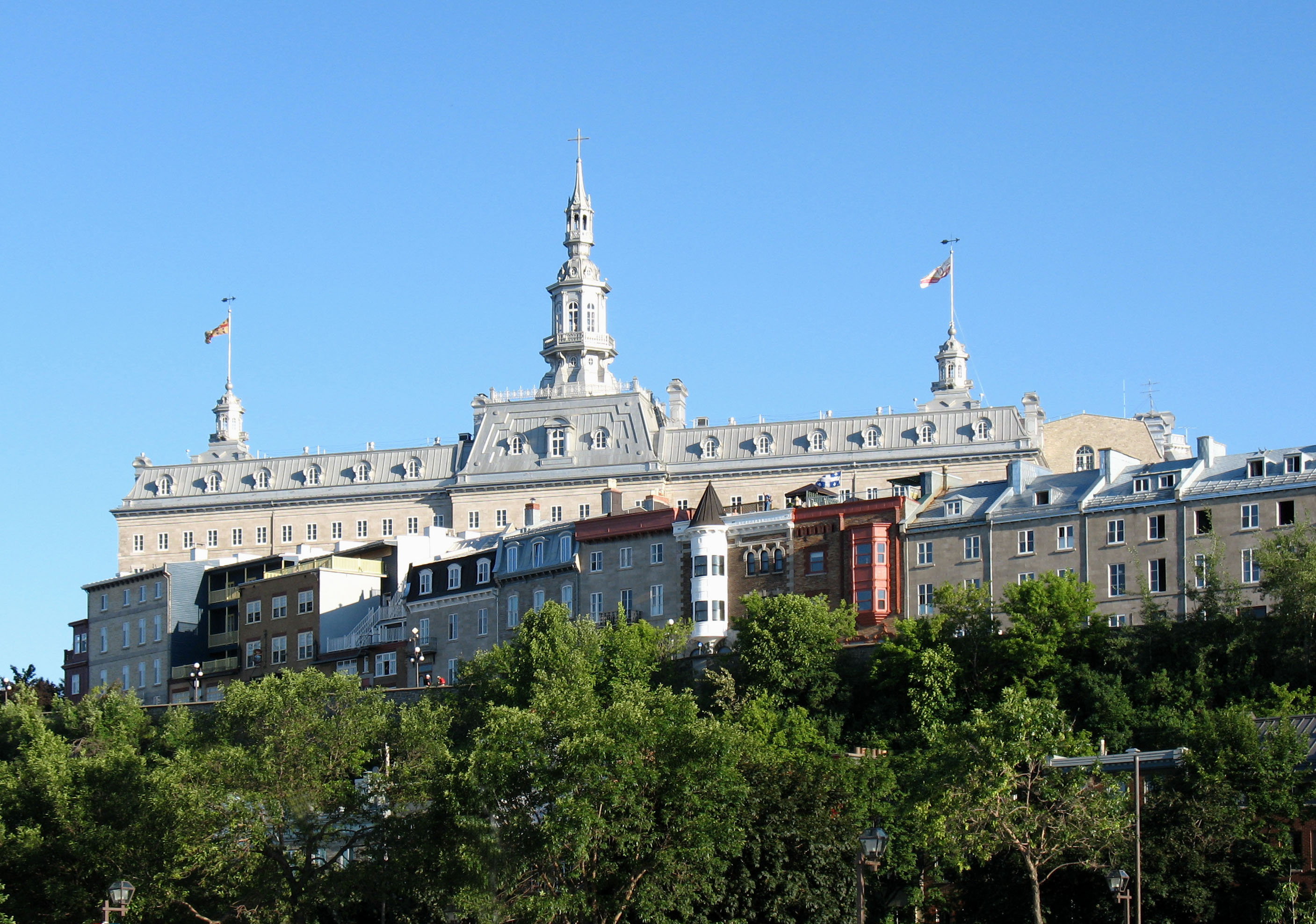 Grand Séminaire de Québec vu du Bassin Louise à Québec, province de Québec, Canada